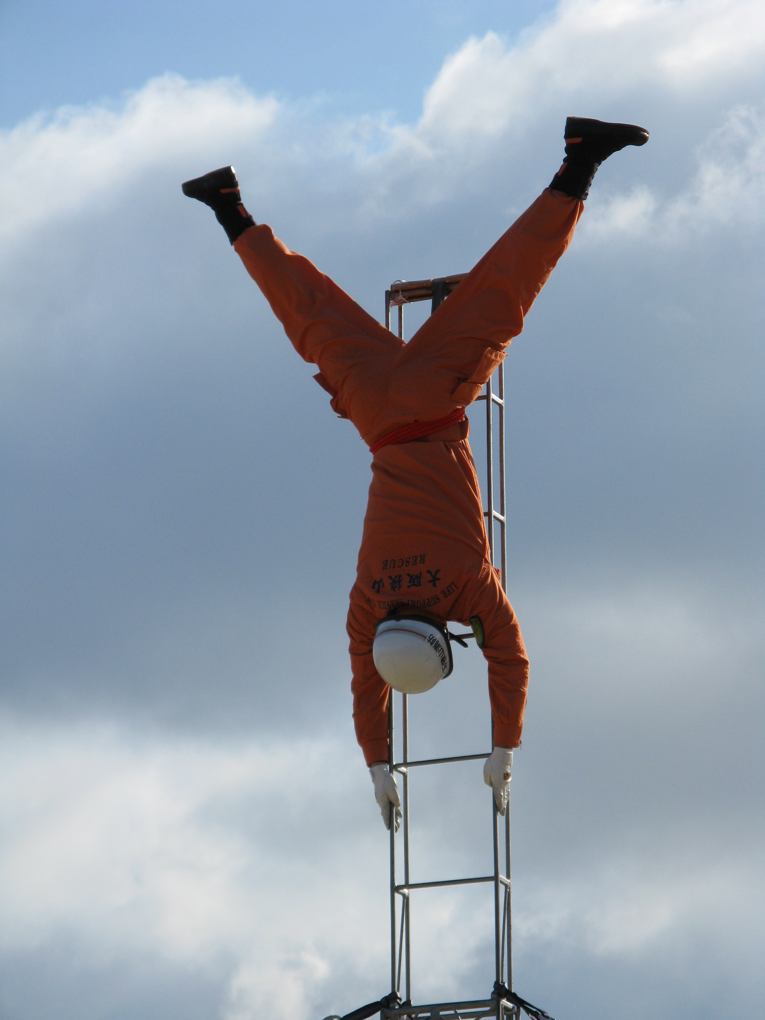 出初め式（大阪狭山市）